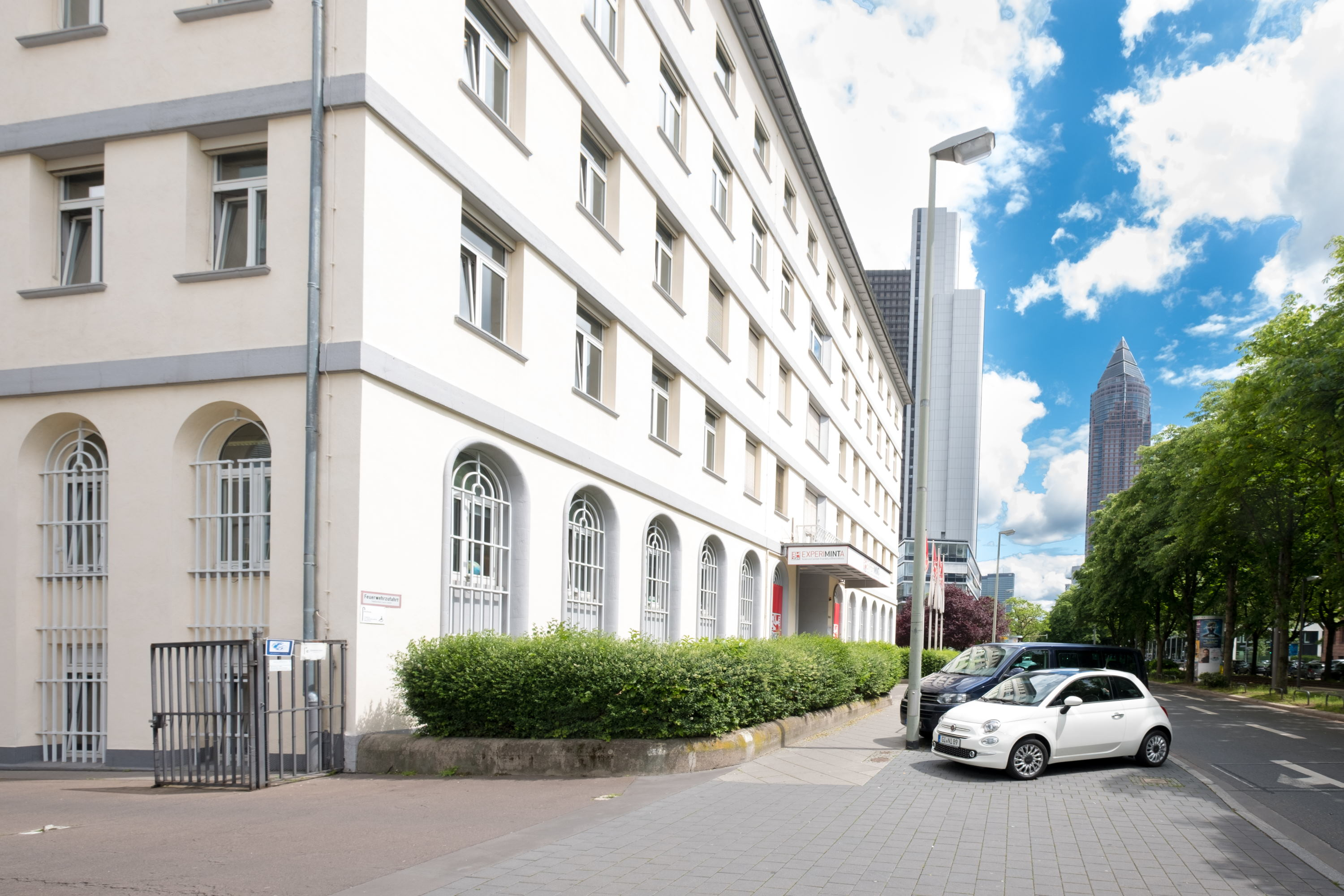 Außenansicht auf das EXPERIMINTA ScienceCenter, vormals Sitz der Vollstreckungsstelle Finanzamt Frankfurt am Main.